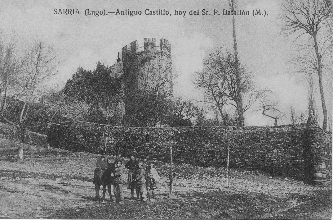 A torre da fortaleza. Sarria, Galicia, Spain